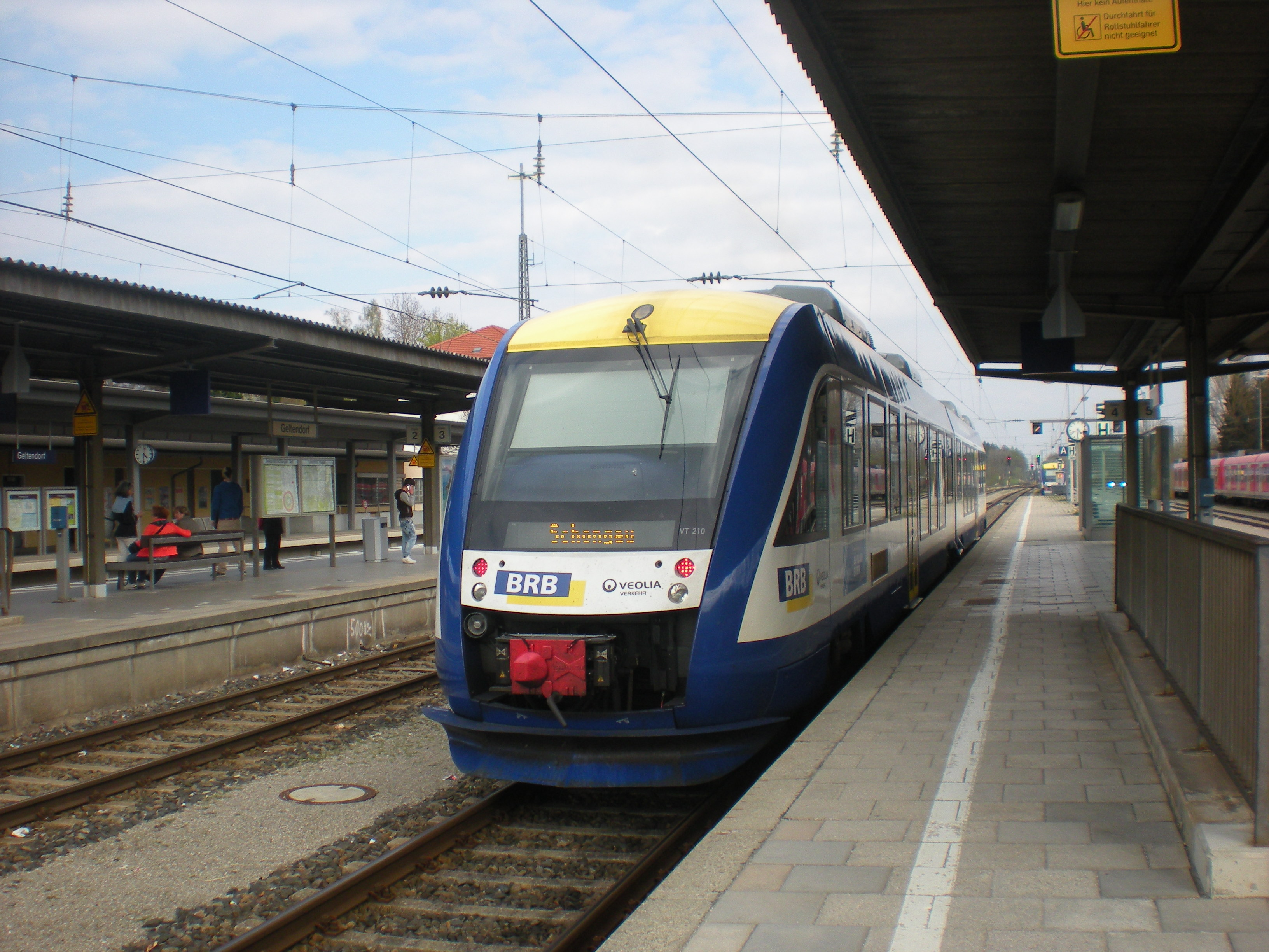 BRB nach Schongau im Bahnhof Geltendorf